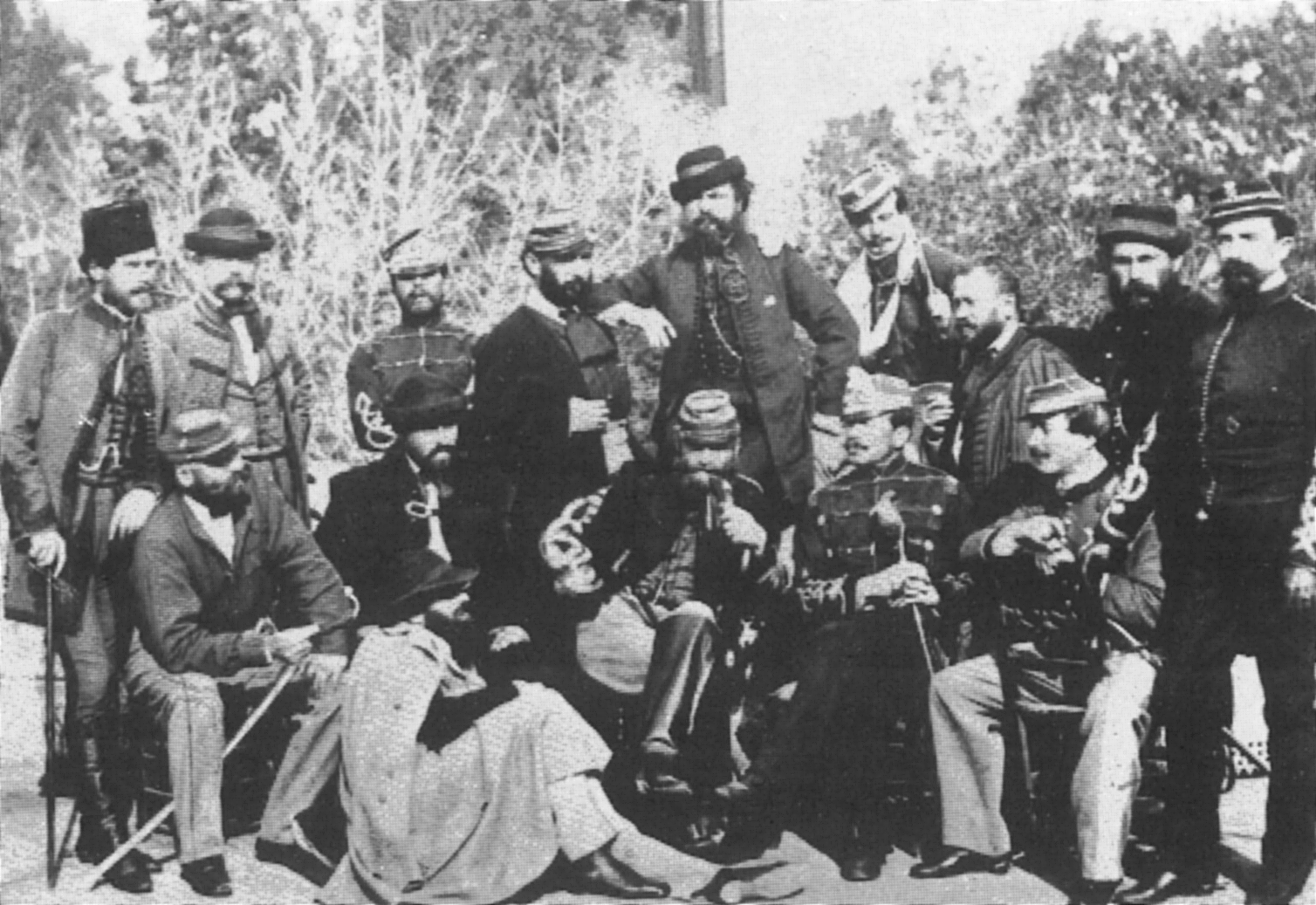 A Garibaldi-légió magyar önkénteseinek csoportja A csoport balszélén Reé János kapitány áll. Önként végigküzdötte a szabadságharcot, utána évekig raboskodott az „Új épületben”, onnan megszökve a Bakonyban bujdosott, majd 1859-ben Klapka György felhívását követve, jelentkezett az olaszországi magyar légióba. A szicíliai és Nápoly környéki harcok után, Türr István nápolyi kormányzósága idején annak szárnysegéde volt.